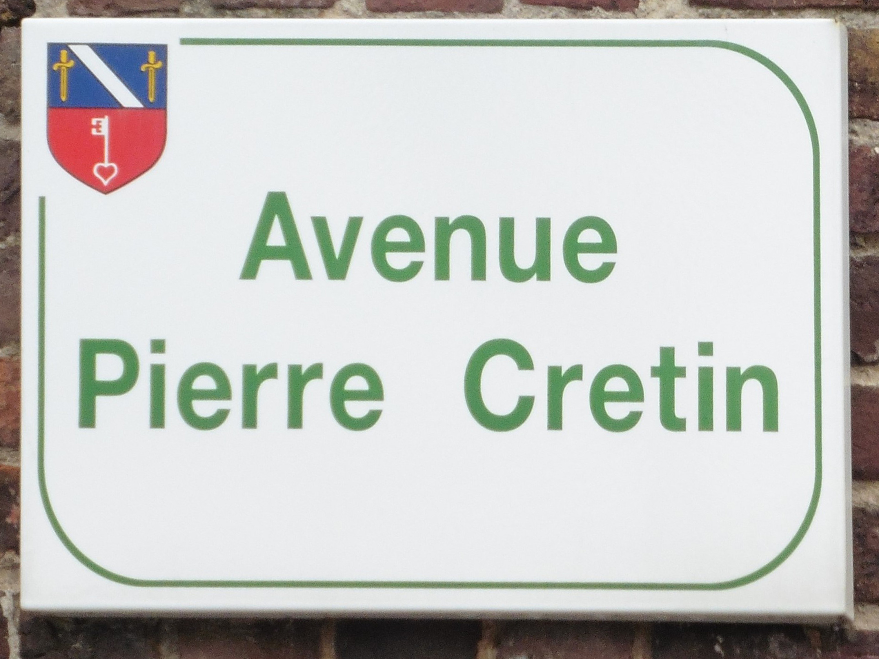 Plaque de la Rue Pierre Crétin : (résistant hasnonais, tué par les Allemands sur la route de Cataine).- Hasnon-la-Cataine Nord.- france